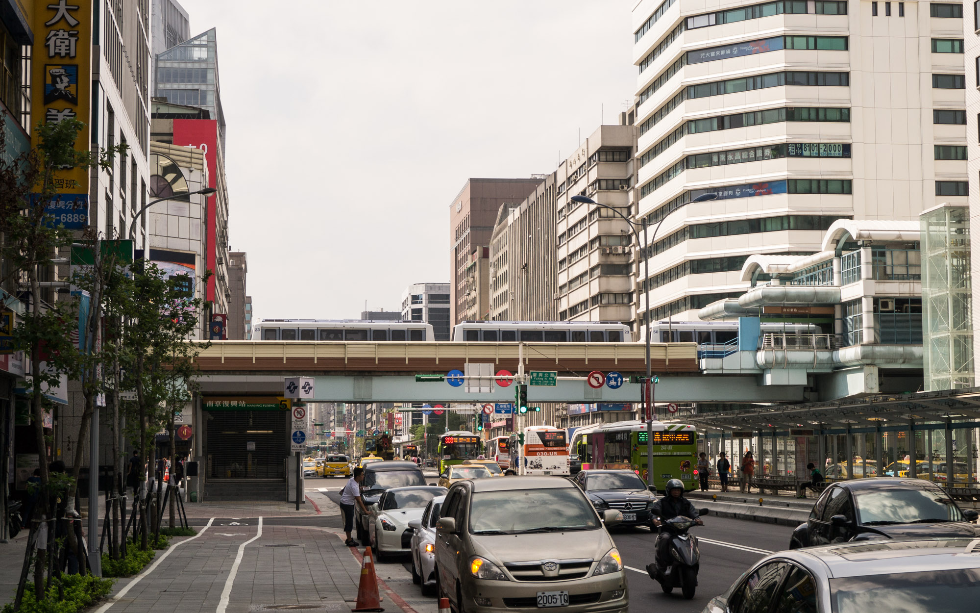 台北捷運文湖線